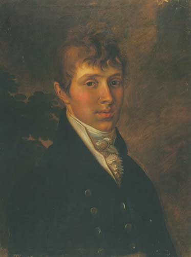 Portret Adama Sozańskiego, olej na płótnie, 65,5 x 48,5 cm, Lwowska Galeria Sztuki